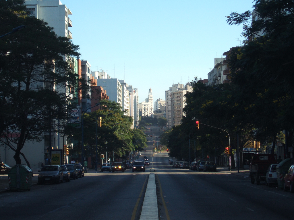 Avda. Libertador, Montevideo, Uruguay. View of barrio Centro from Aguada.